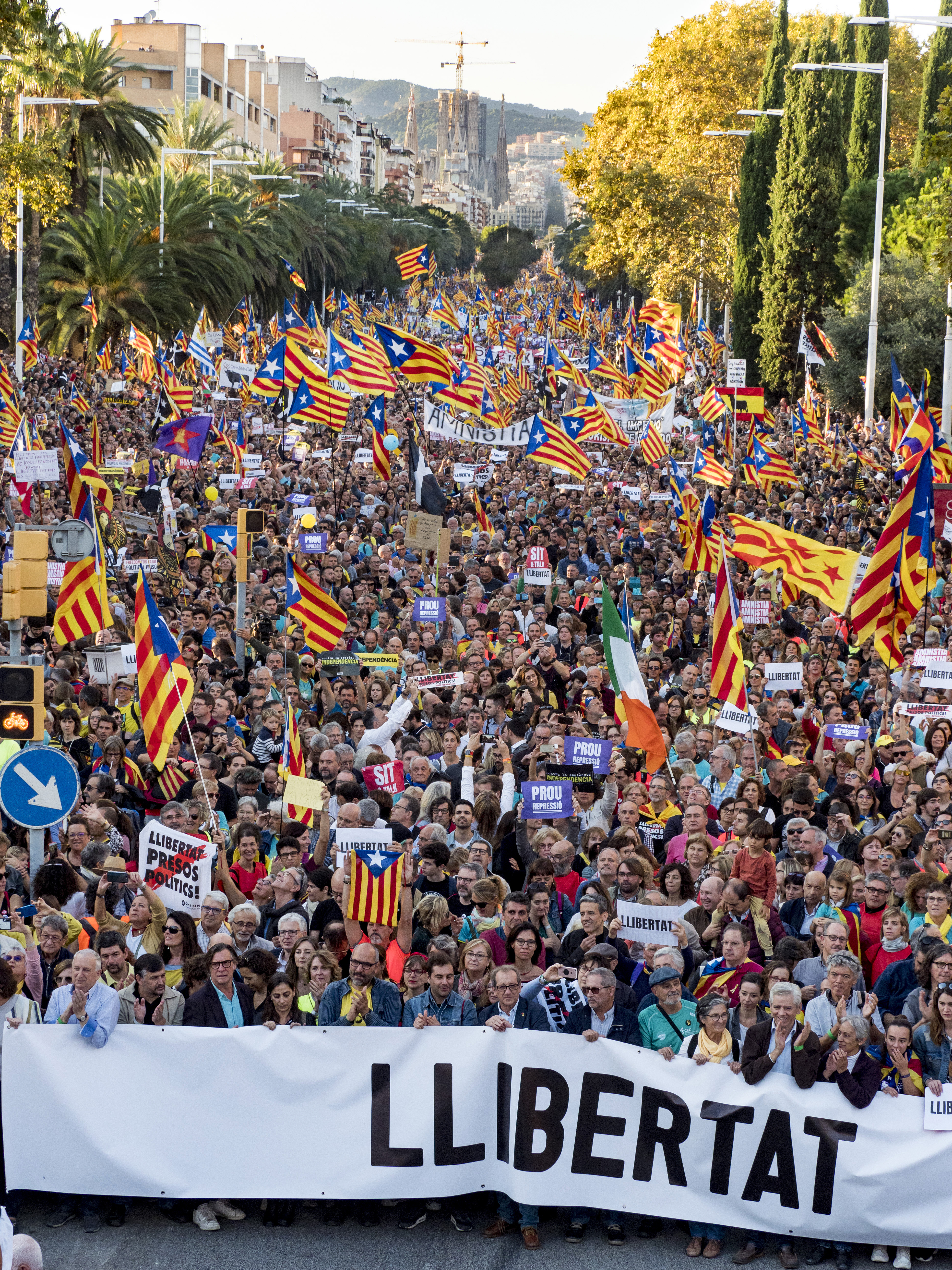 "LLIBERTAT" Manifestació 26 d'octubre de 2019 ©Dani Codina/Òmnium